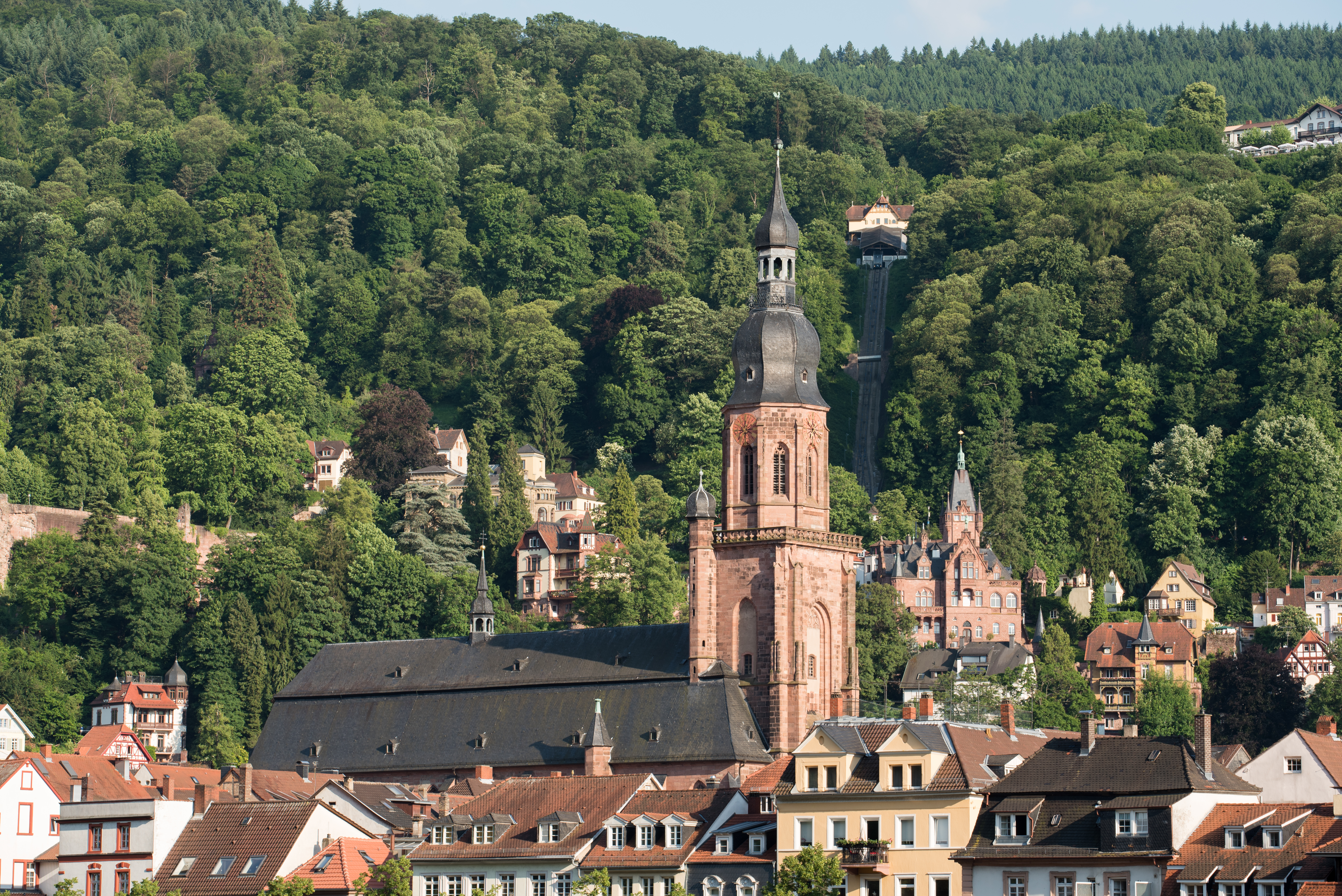 Heidelberg, Heiliggeistkirche